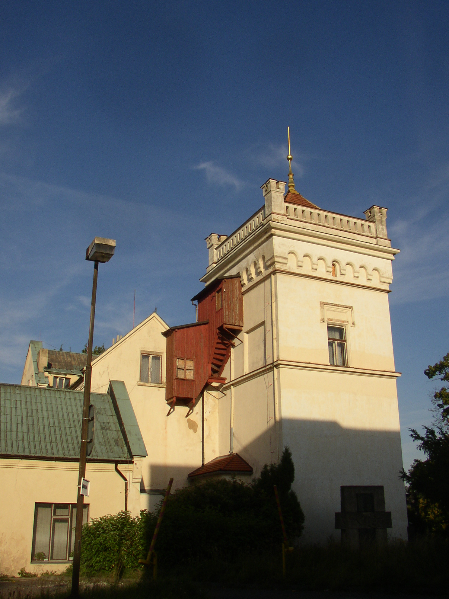 Bachrovna, Kladno. Pohled zboku zezadu, od západu.